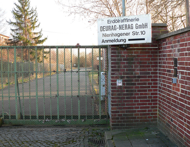 Deurag Nerag Eingang in Hannover-Misburg